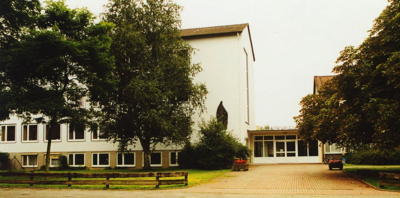 Portal der Eichendorffschule in Wolfsburg